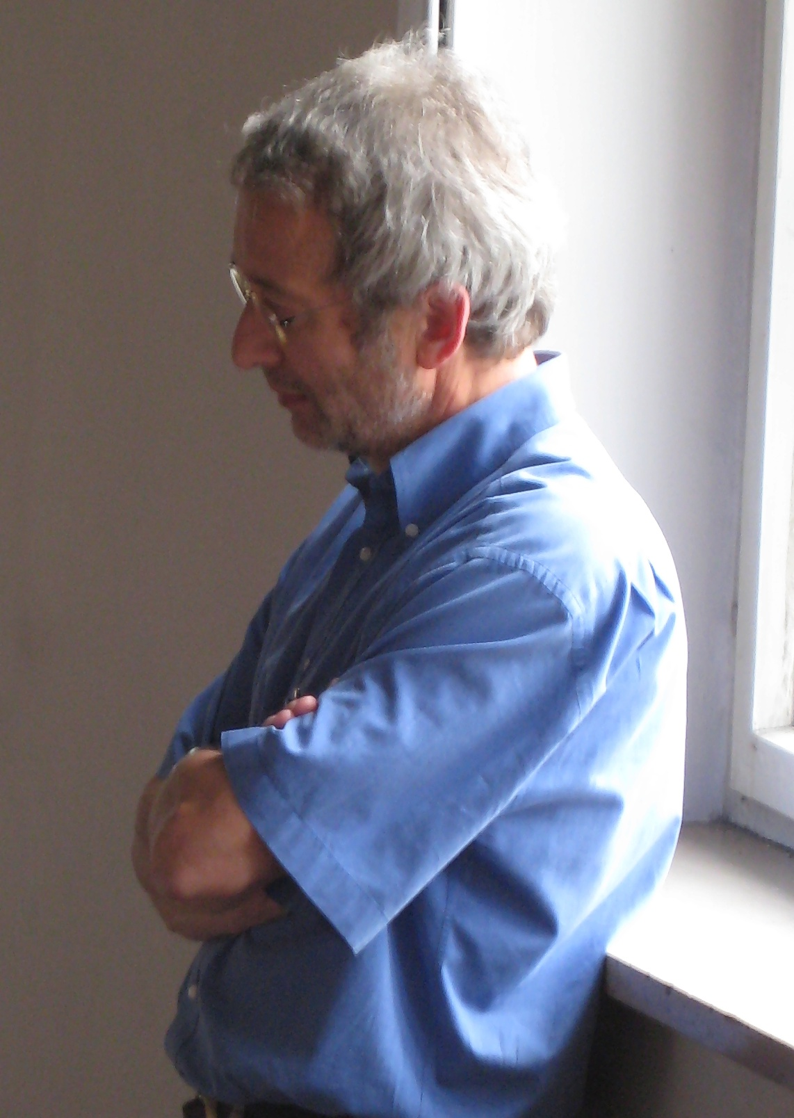 Prof. Dr. Erhard Fischer bei einer Gastvorlesung von Barbara Fornefeld an der Universität Würzburg im Jahre 2007